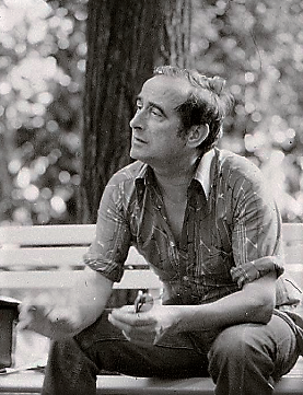 Portraits de Guy Rétoré par Fernand Michaud . Festival d'Avignon, 1977.